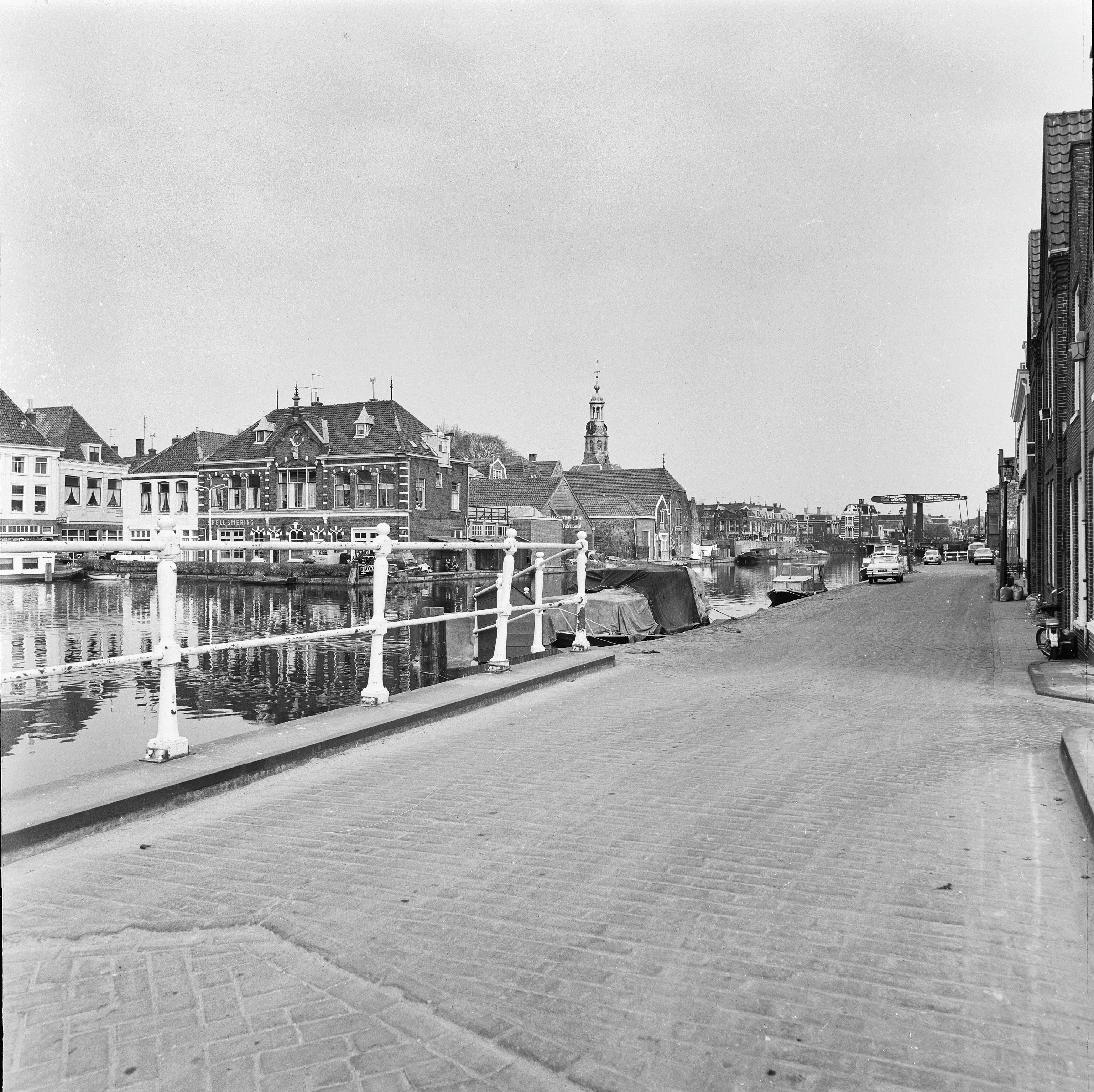 Overzichten: De Haven, overzicht langs de Havenkade